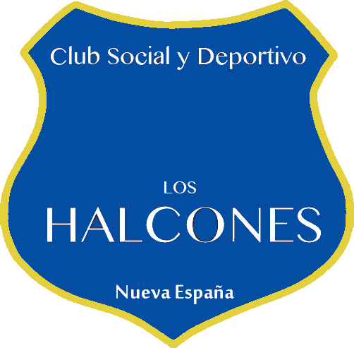 Escudo del Club Social y Deportivo Los Halcones, sin el halcón